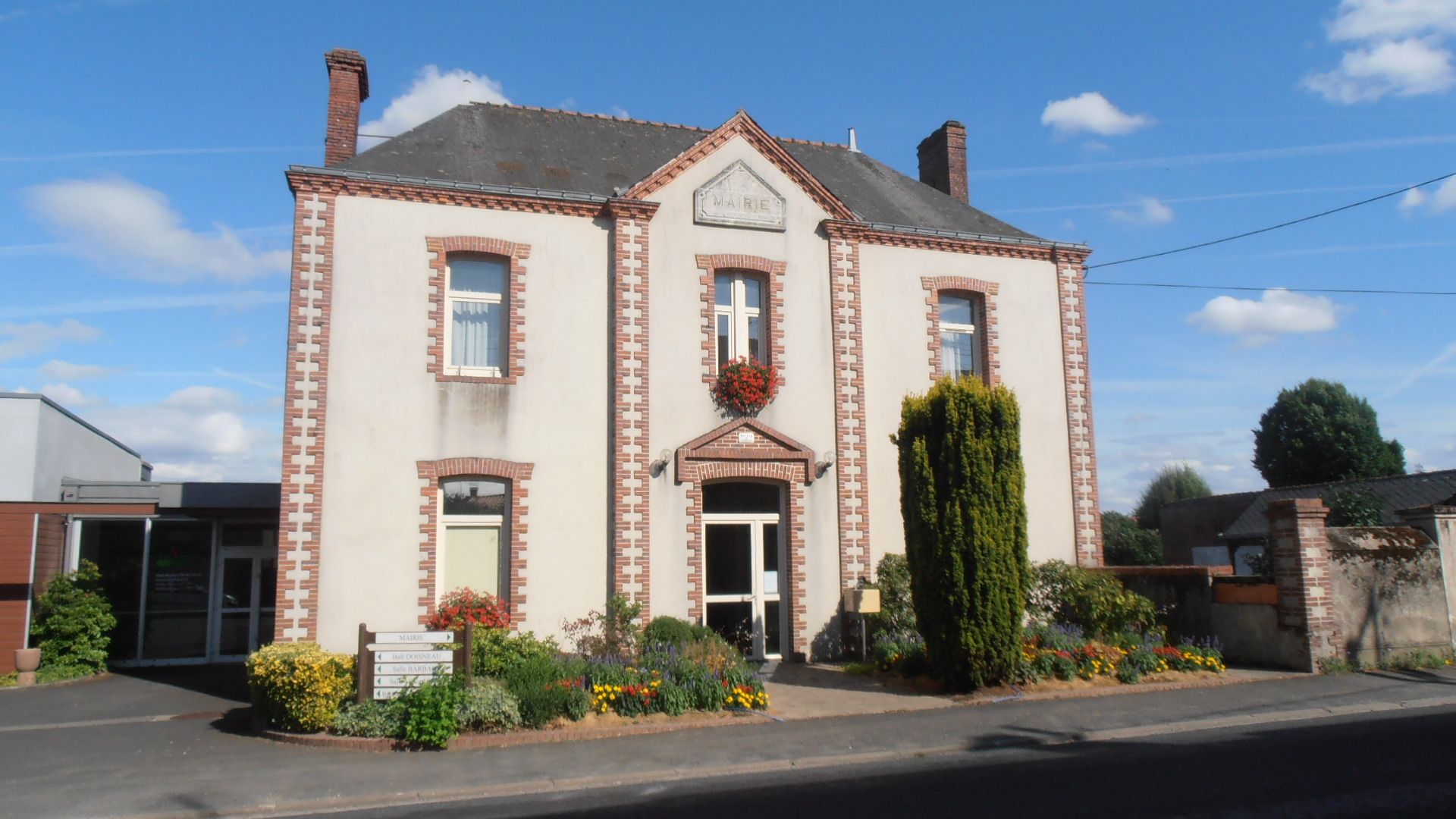 La mairie de Bourgneuf-en-Mauges (Maine-et-Loire, France).